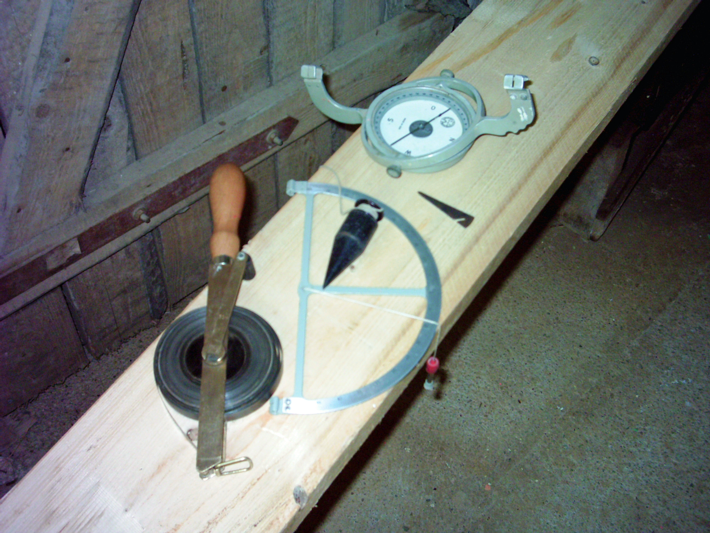 Hängezeug, bestehend aus Gradbogen, Hängekompaß, Stahlbandmaß und Schnurlot.